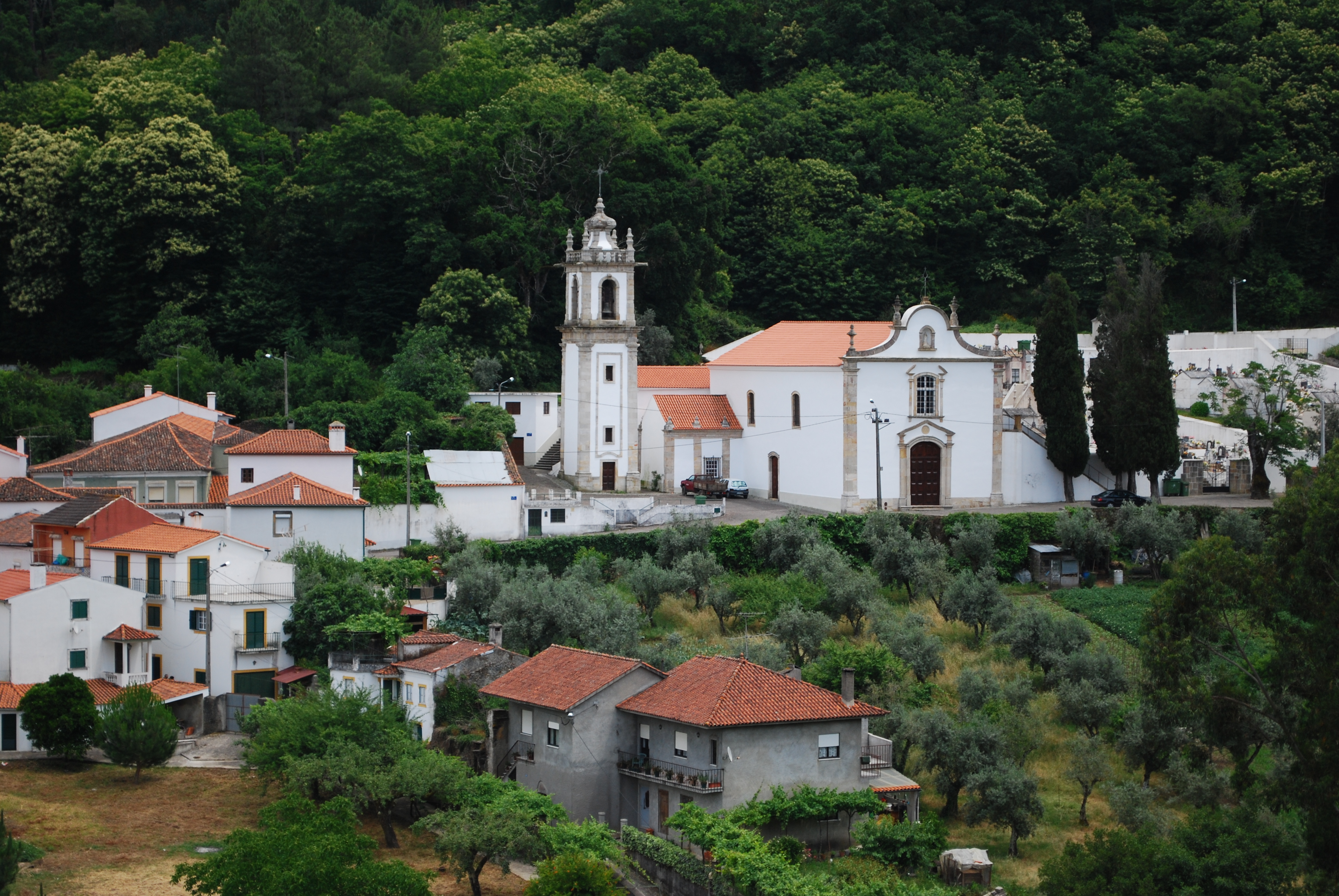 Igreja de Góis ou Igreja de Santa Maria Maior This file was uploaded for Wiki Loves Monuments in Portugal with the unique identifier 70290.